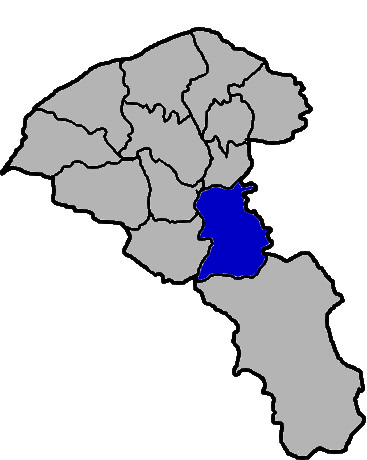 KaurJmeb為編輯中華民國臺灣省桃園縣大溪鎮，於2005年2月7日所繪。